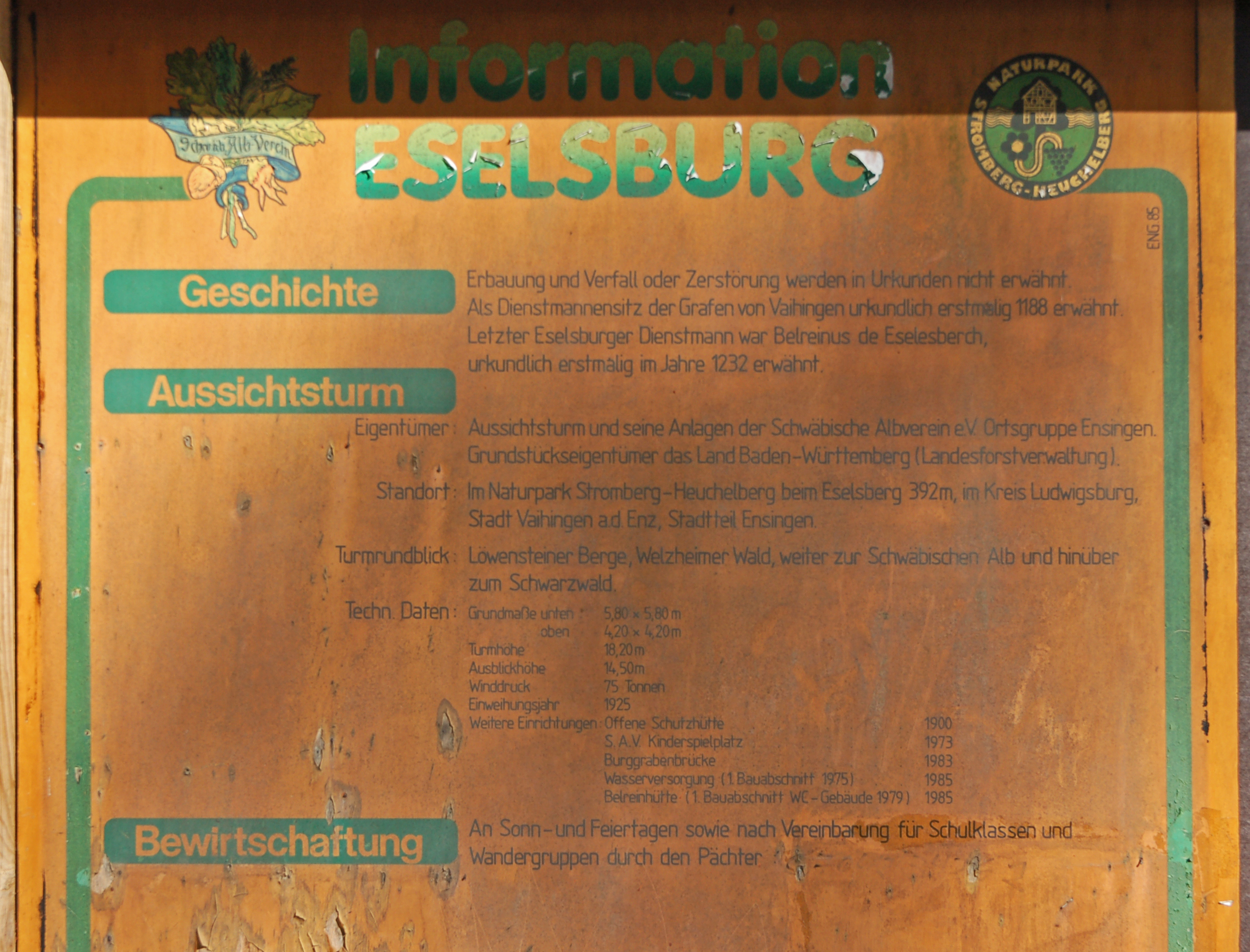 Info-Tafel auf dem Eselsberg